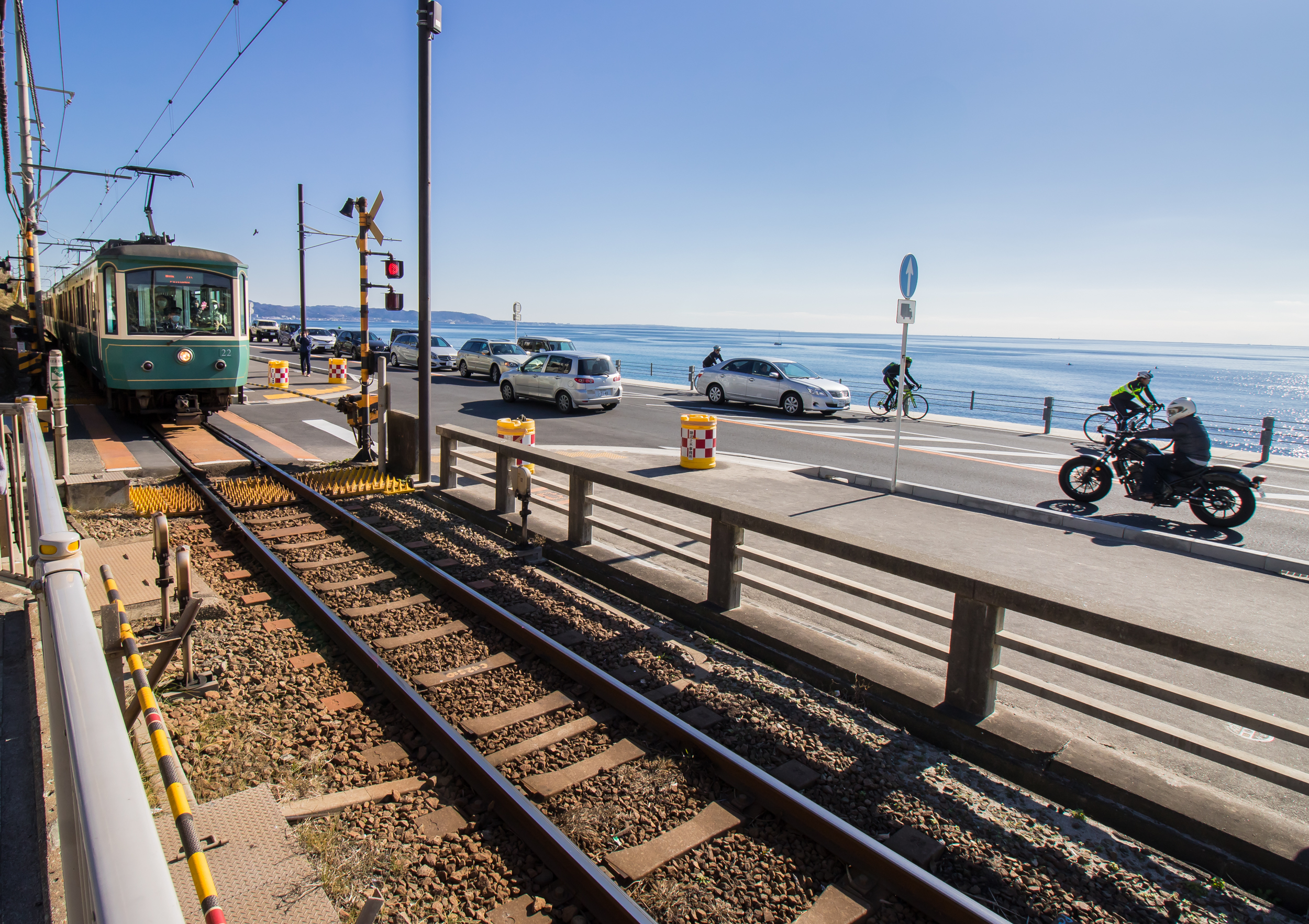 湘南海岸を走る江ノ電（鎌倉高校前駅近くの踏切）